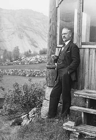 Norwegian painter Lars Osa.